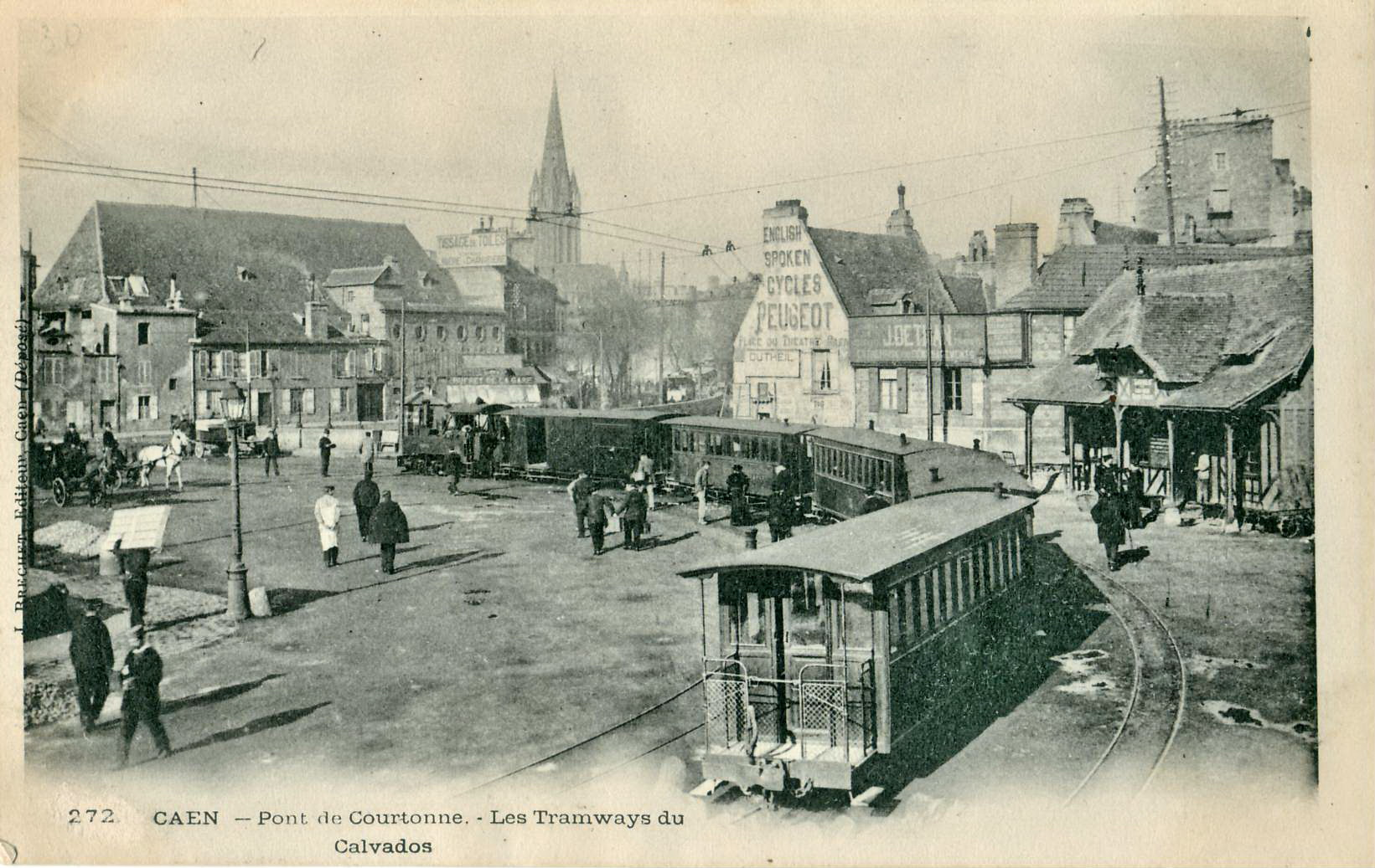 CAEN : Pont de Courtonne - Les tramways du Calvados